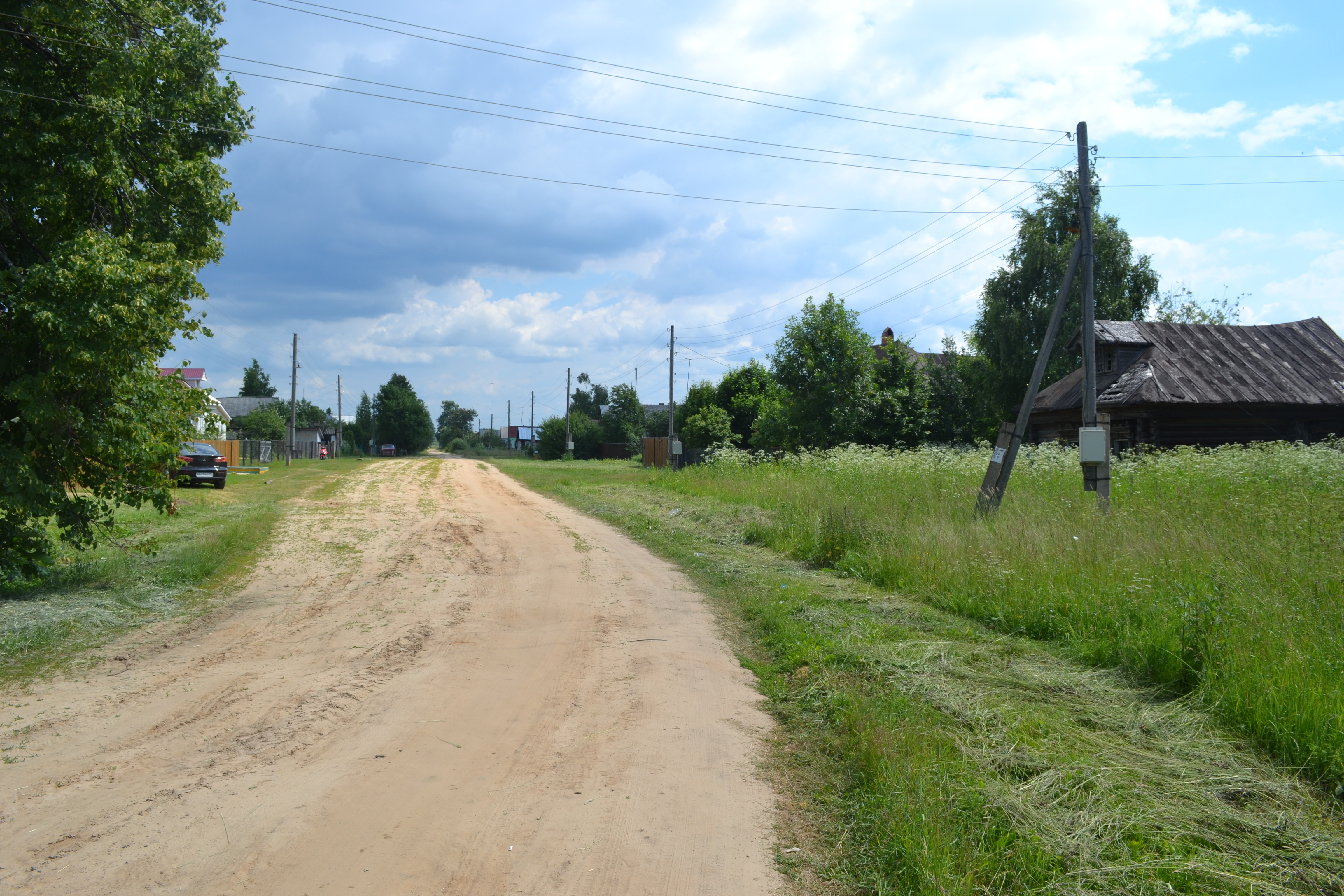 Шеино (Шатурский район)